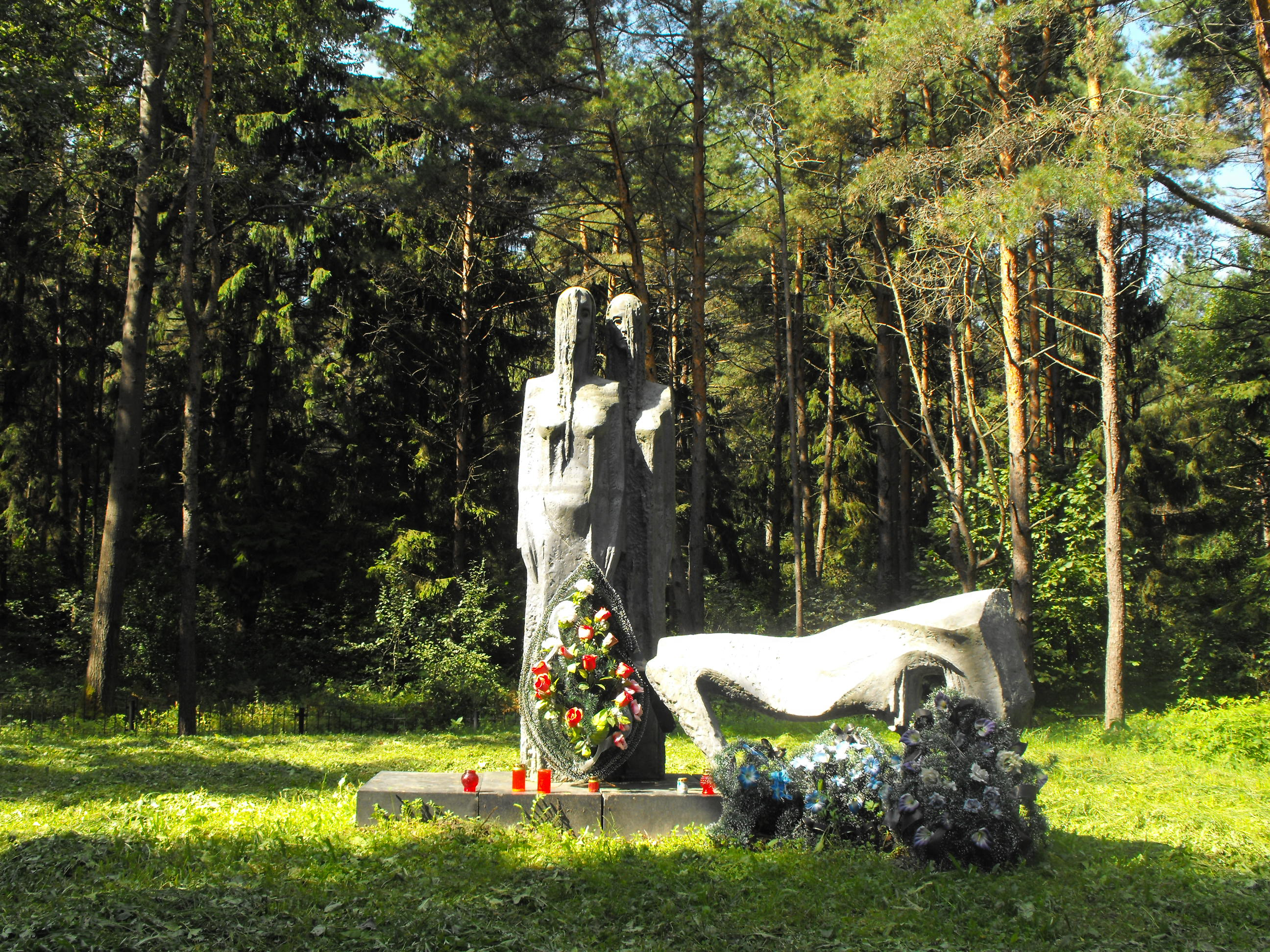 Мемориал на месте убийства нацистами и их пособниками 6700 евреев Лиды. Находится в 150 метрах от кольцевой дороги Лиды на продолжении улицы Красноармейская справа от неё в лесу, рядом с мемориалом "Детская могила".